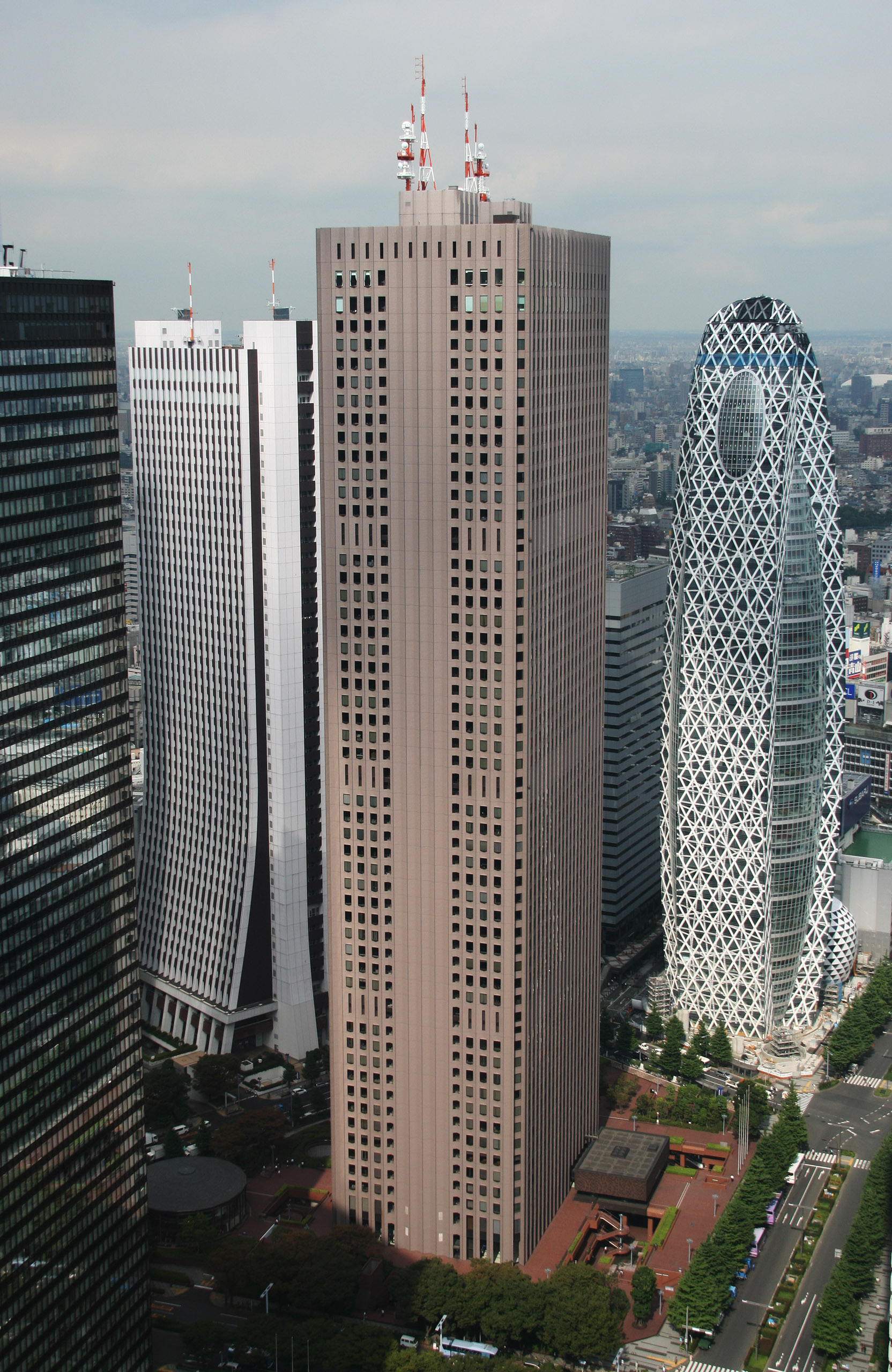 Shinjuku Center Building